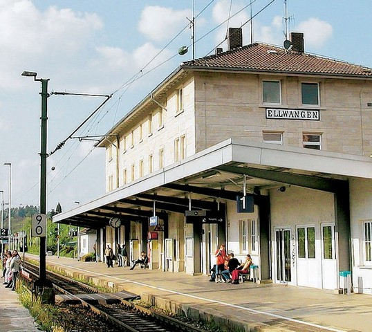 Foto von Gleis 2 auf das Bahnhofsgebäude des Bahnhofs Ellwangen an der Jagst